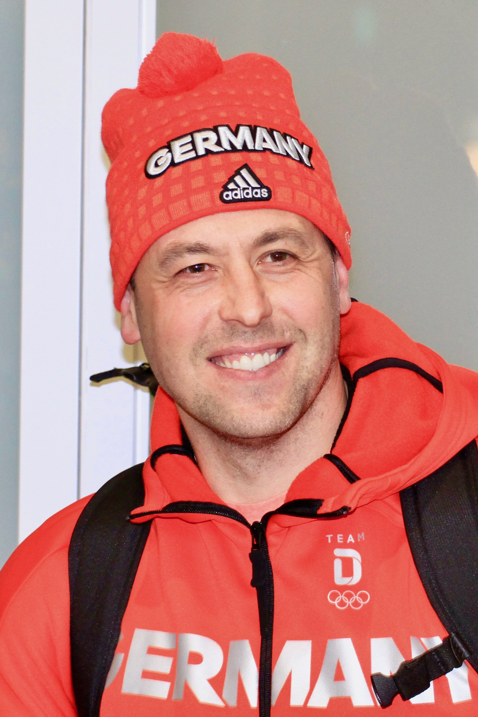 Trainer der Deutschen Eishockeynationalmannschaft 2018 bei Ankunft.